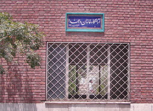 Template:Move to Commons